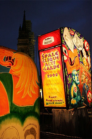 Basler Fasnacht 05: Ladäärne-Uustellig (Münsterplatz)